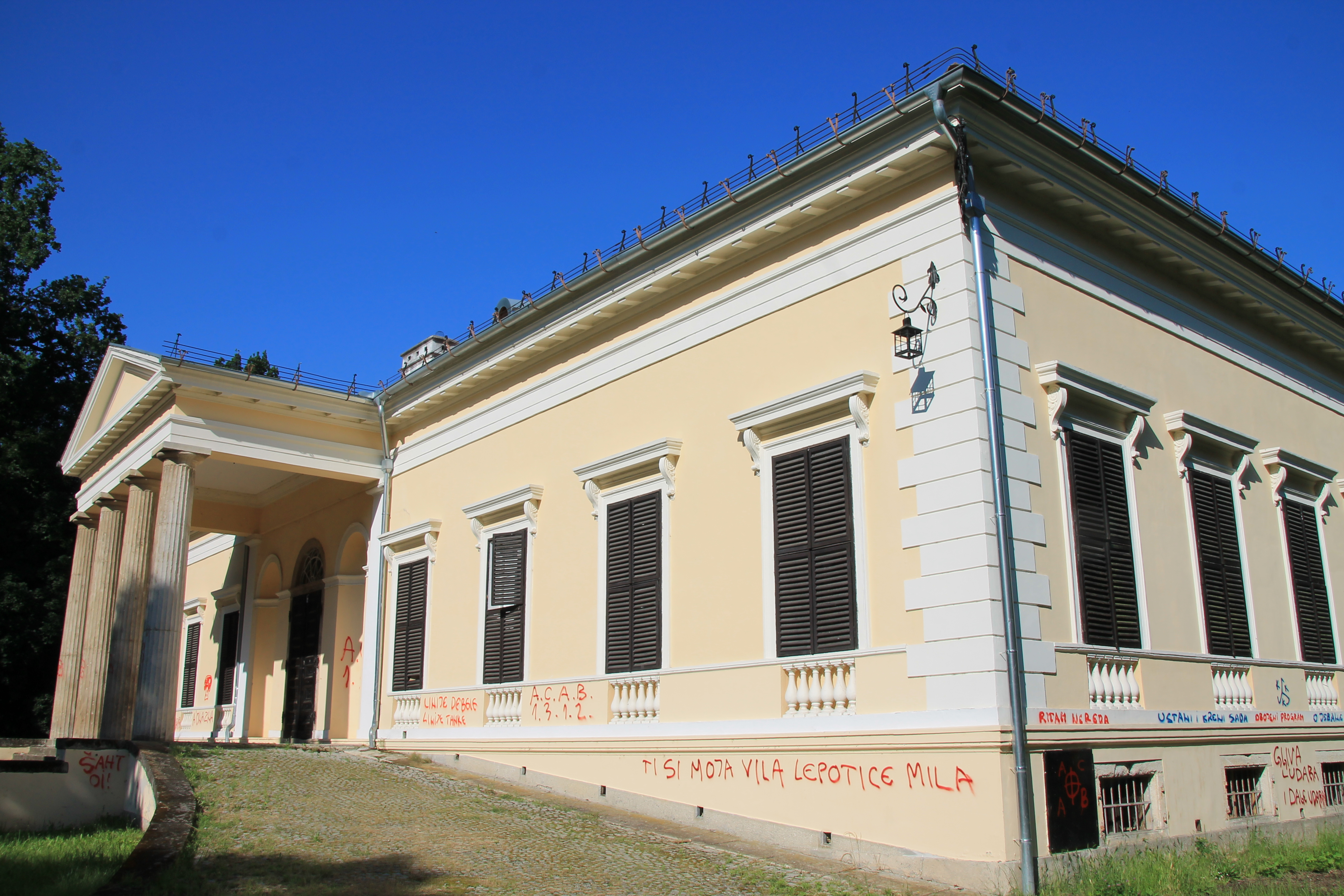 Dvorac Dunđerski (Čelarevo)